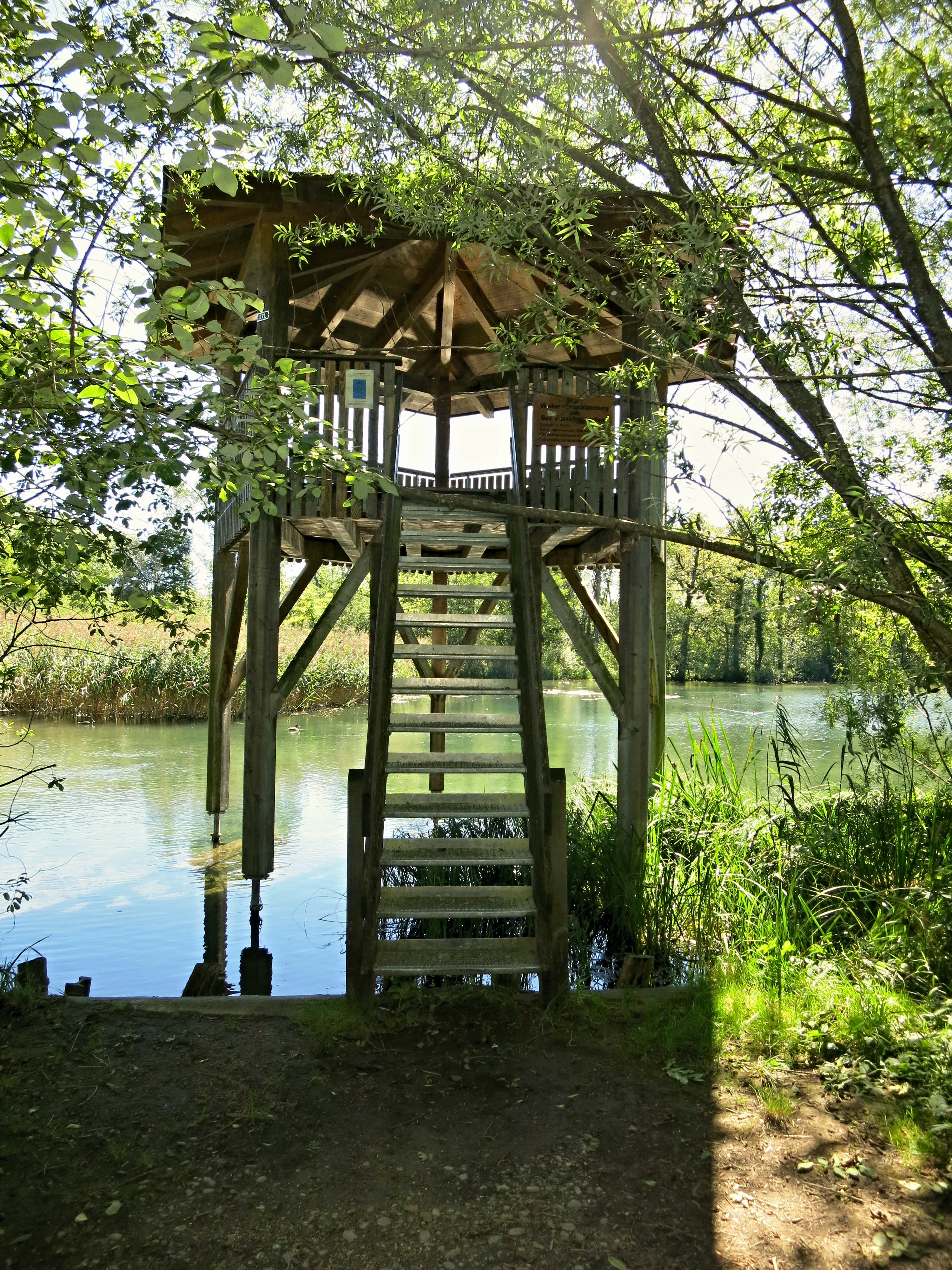 Beobachtungsturm Entenweiher